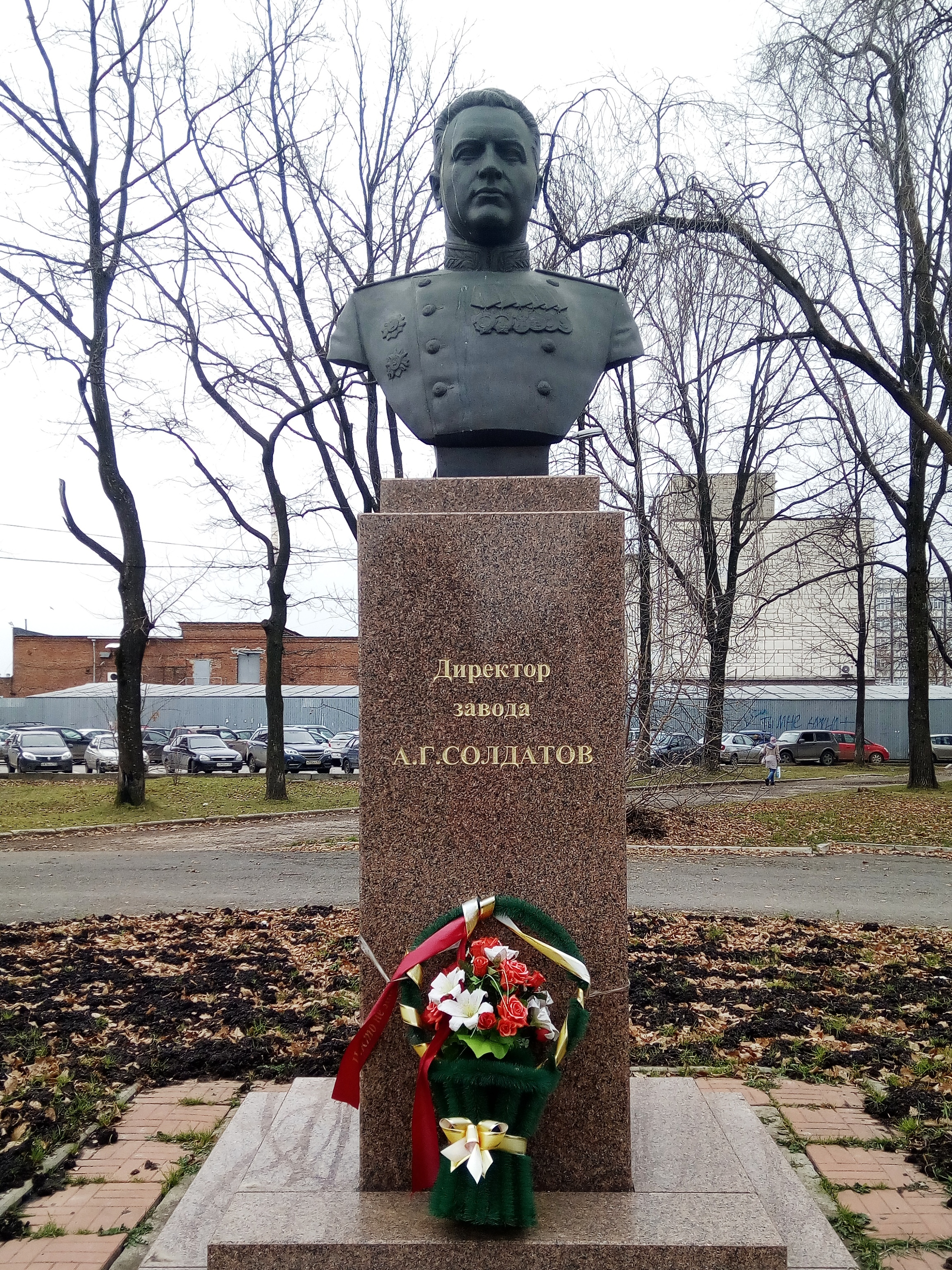 Бюст А. Г. Солдатова в сквере имени А. Г. Солдатова (Пермь)